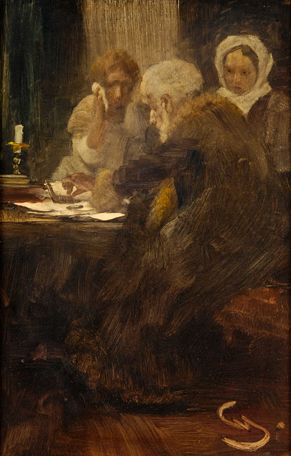 Beim Homöopathen, Mischtechnik auf Papier/Holz, 52 x 34 cm